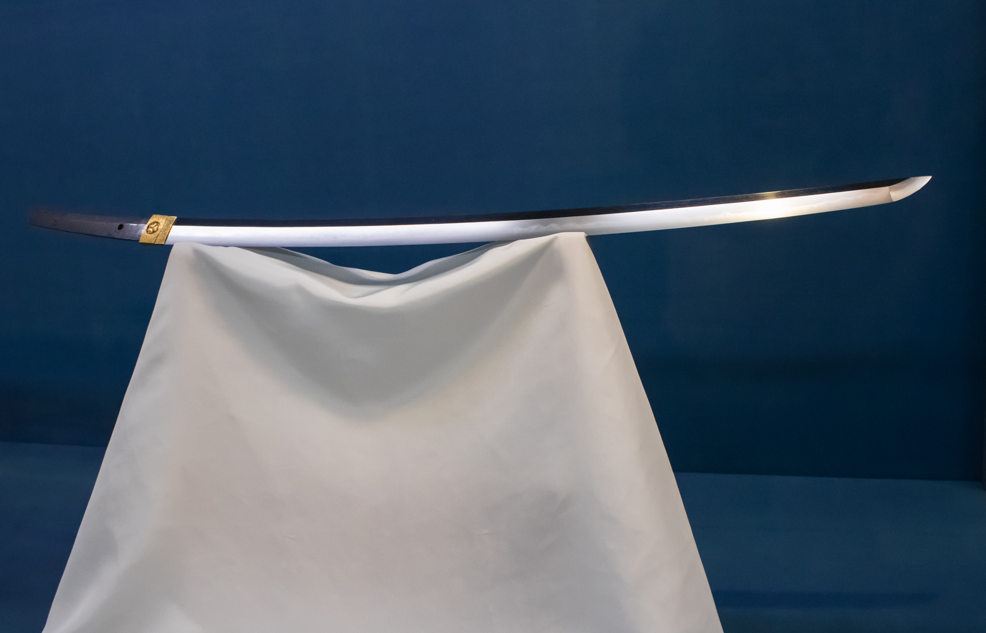 太刀 - 「銘 助真」福岡一文字助真（国宝）、鎌倉時代・13世紀。東京国立博物館。